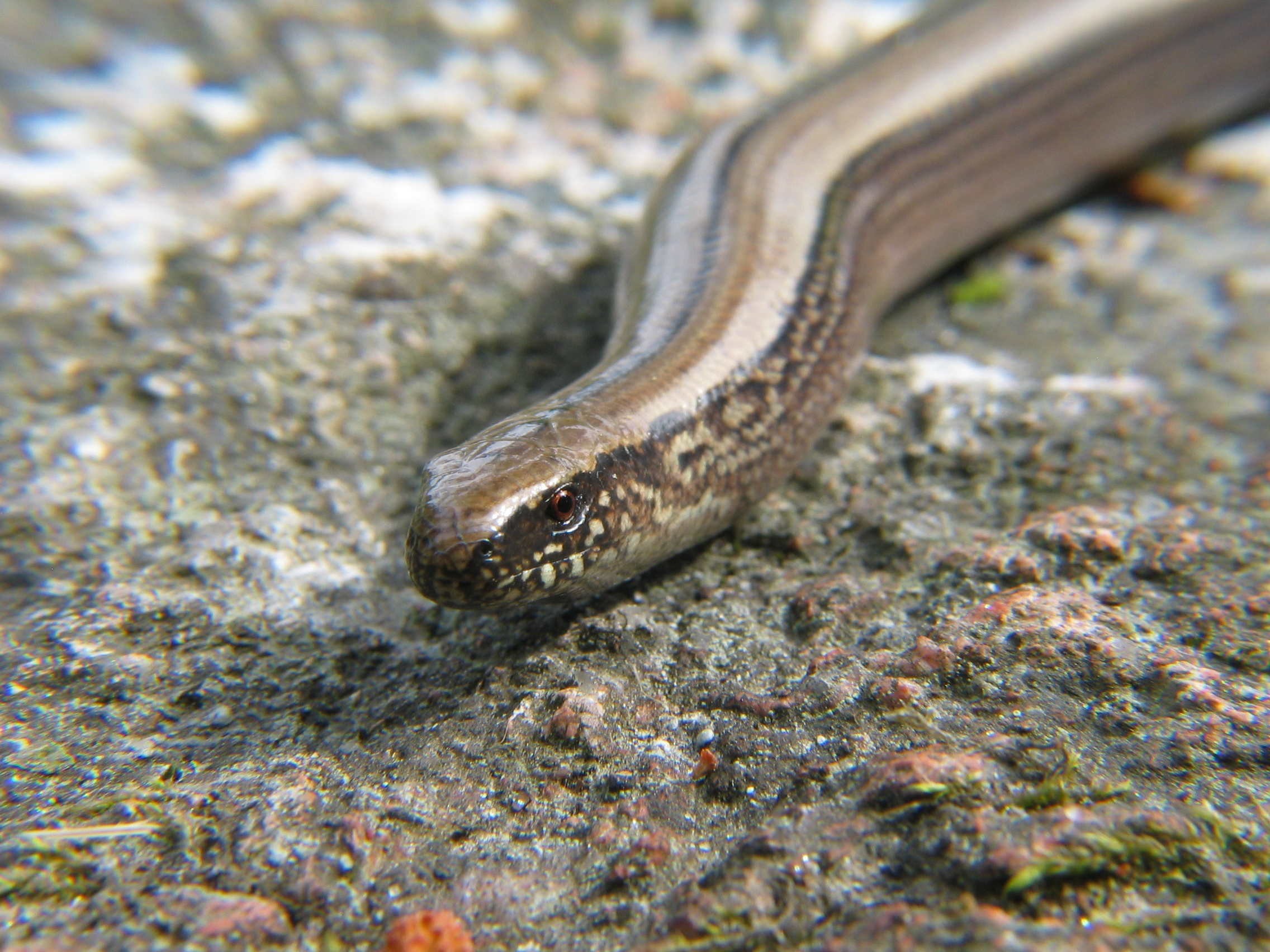 Slowworm, photo taken in Sweden